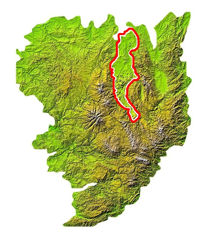 Situation de la plaine de la Limagne sur la carte du Massif central (Limagnes de Brioude, Issoire, boubonnaise et Grande limagne).